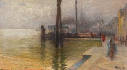 "Canale della Giudecca"